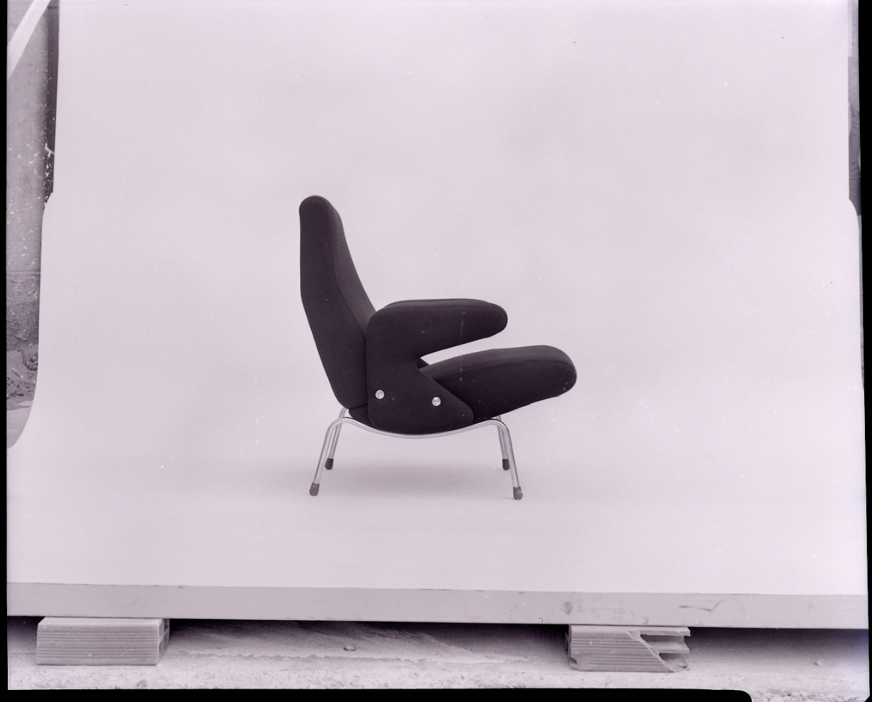 Poltrona "Delfino" di Arflex. Servizio fotografico : Milano, 1975 / Paolo Monti. - Buste: 8, Fototipi: 8 : Negativo b/n, gelatina bromuro d'argento/ pellicola ; 10x12. - ((Serie costituita da 8 negativi identificati con i nn.: 5384-5391. La suddetta serie è contenuta nella scatola identificata con la numerazione G5253-5391. Sul coperchio della scatola manoscritto: "Ar-Flex". - Fonte: Rubrica di Paolo Monti: Archivio 10x12 (ultimi numerati) - dal G1 al (s.d.), presso Archivio Paolo Monti